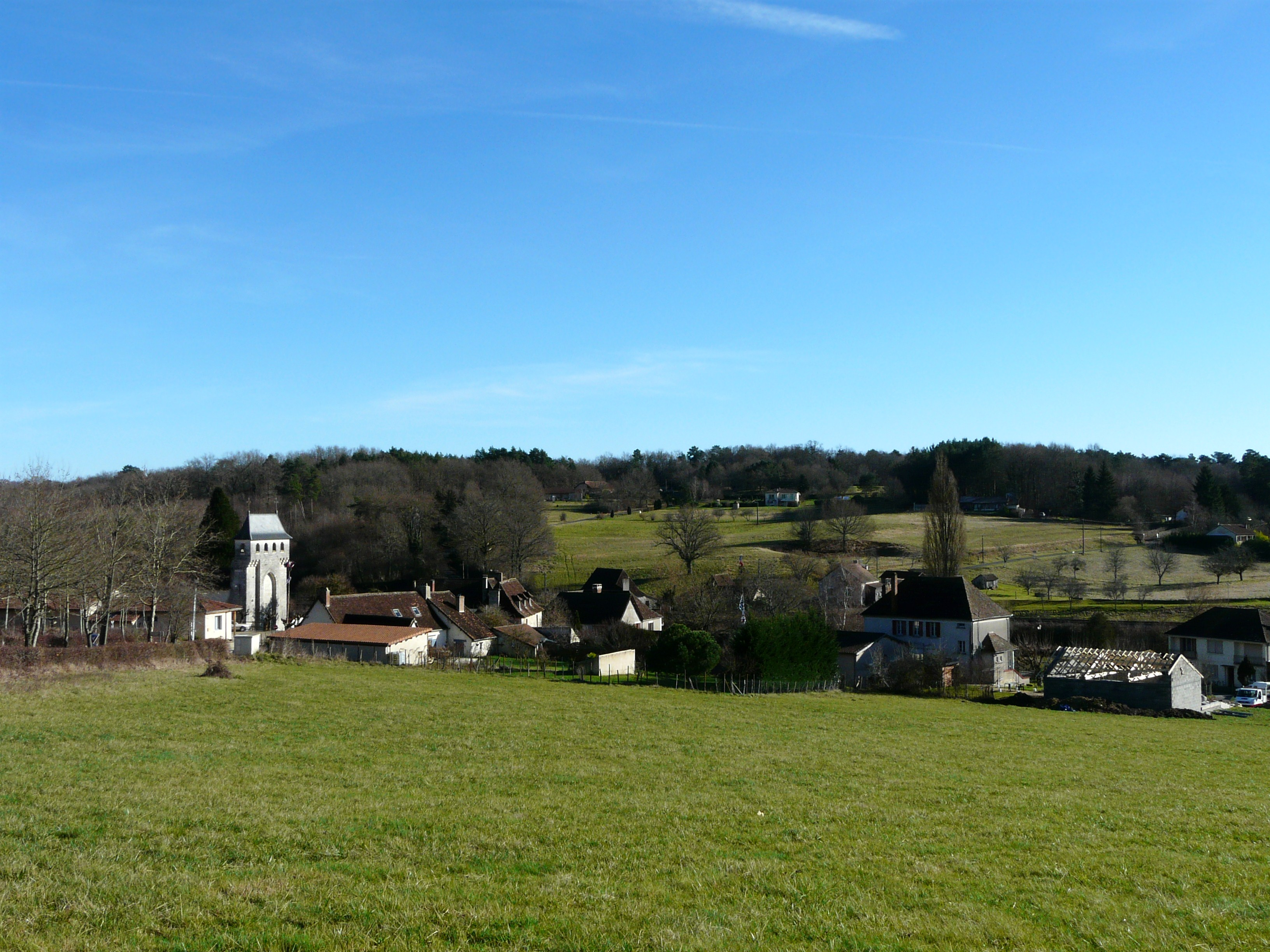 Le bourg de Saint-Antoine-d'Auberoche, Dordogne, France.